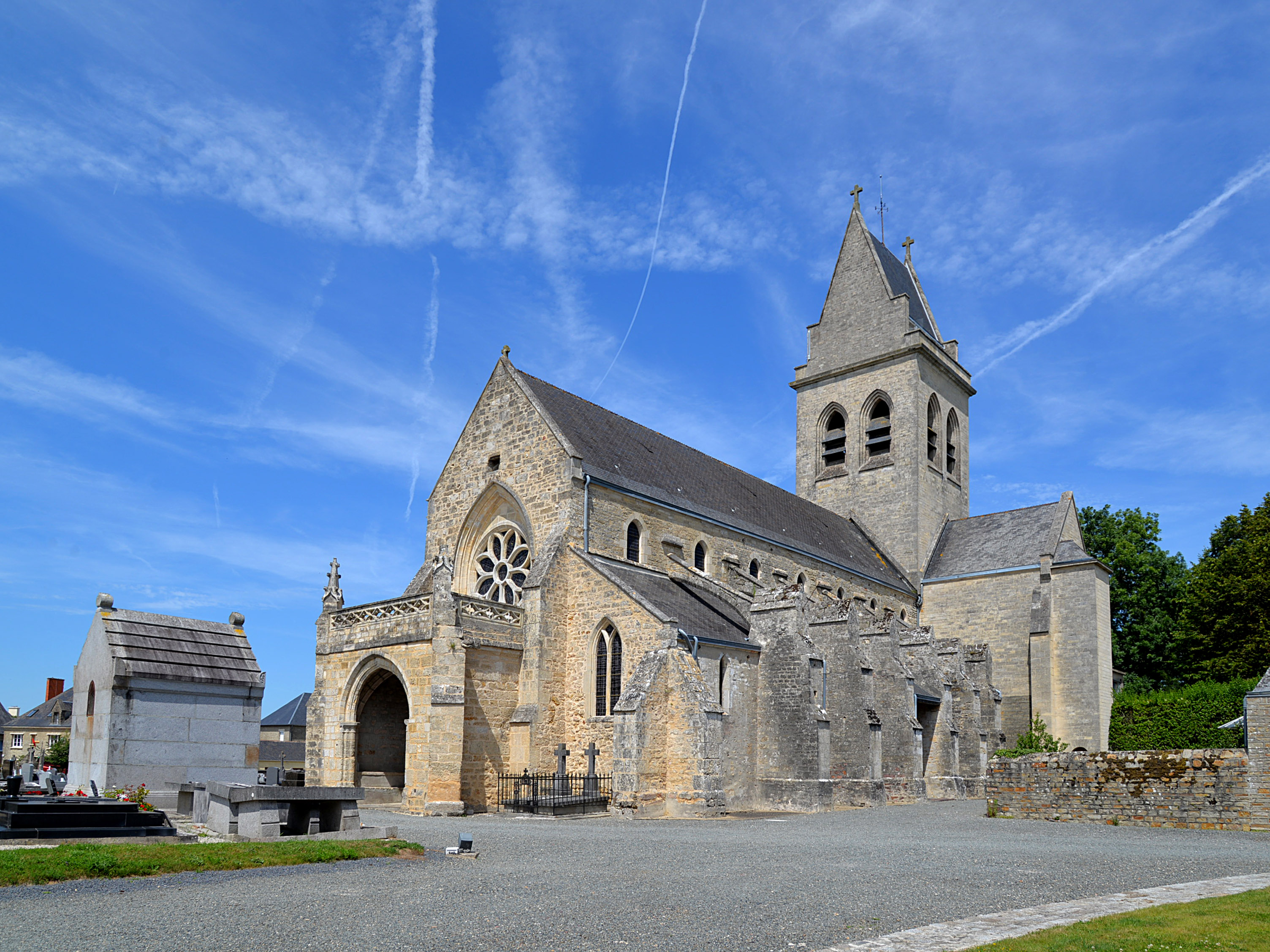 Sainteny (Manche)